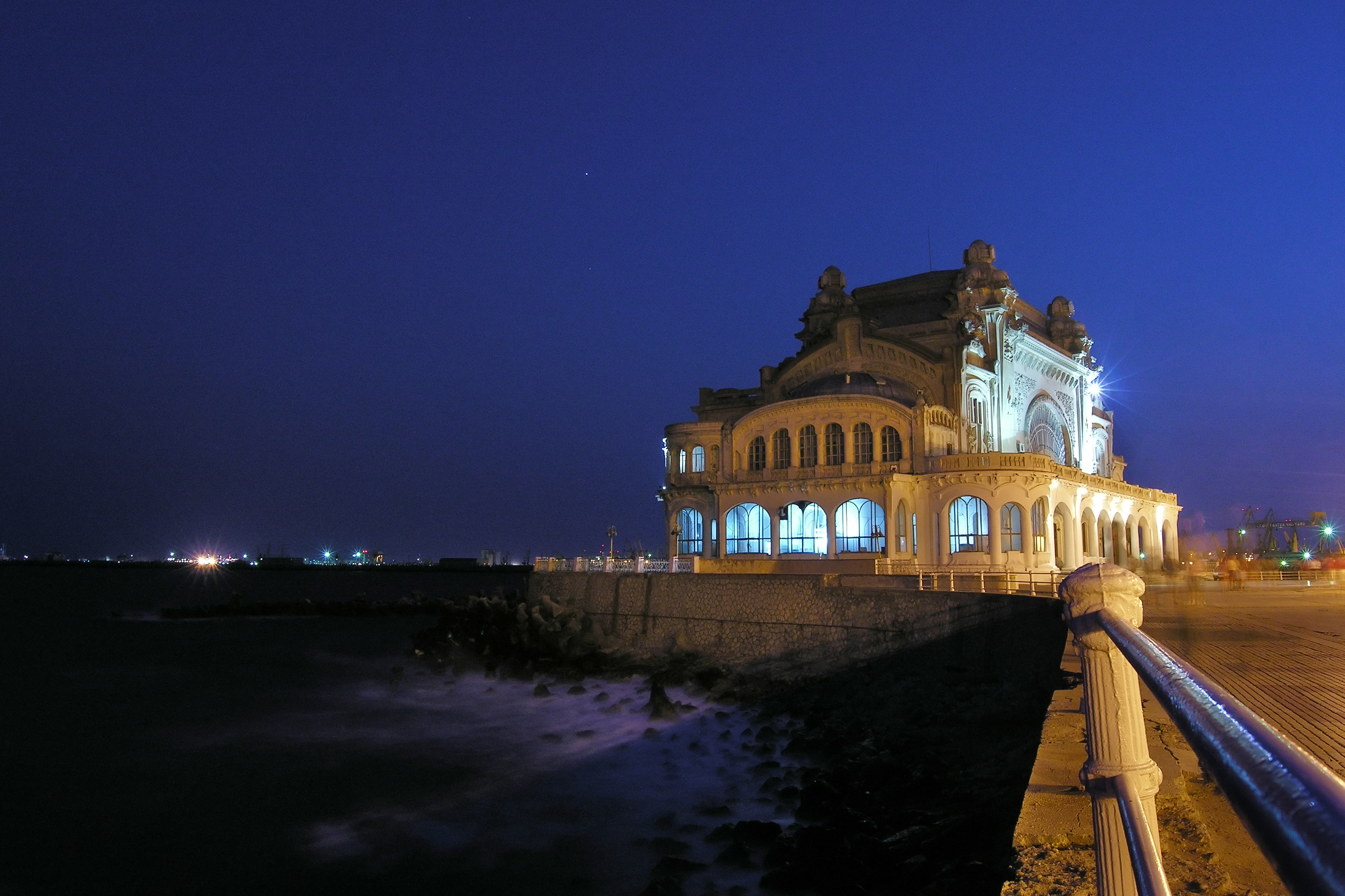 Cazinoul din Constanta